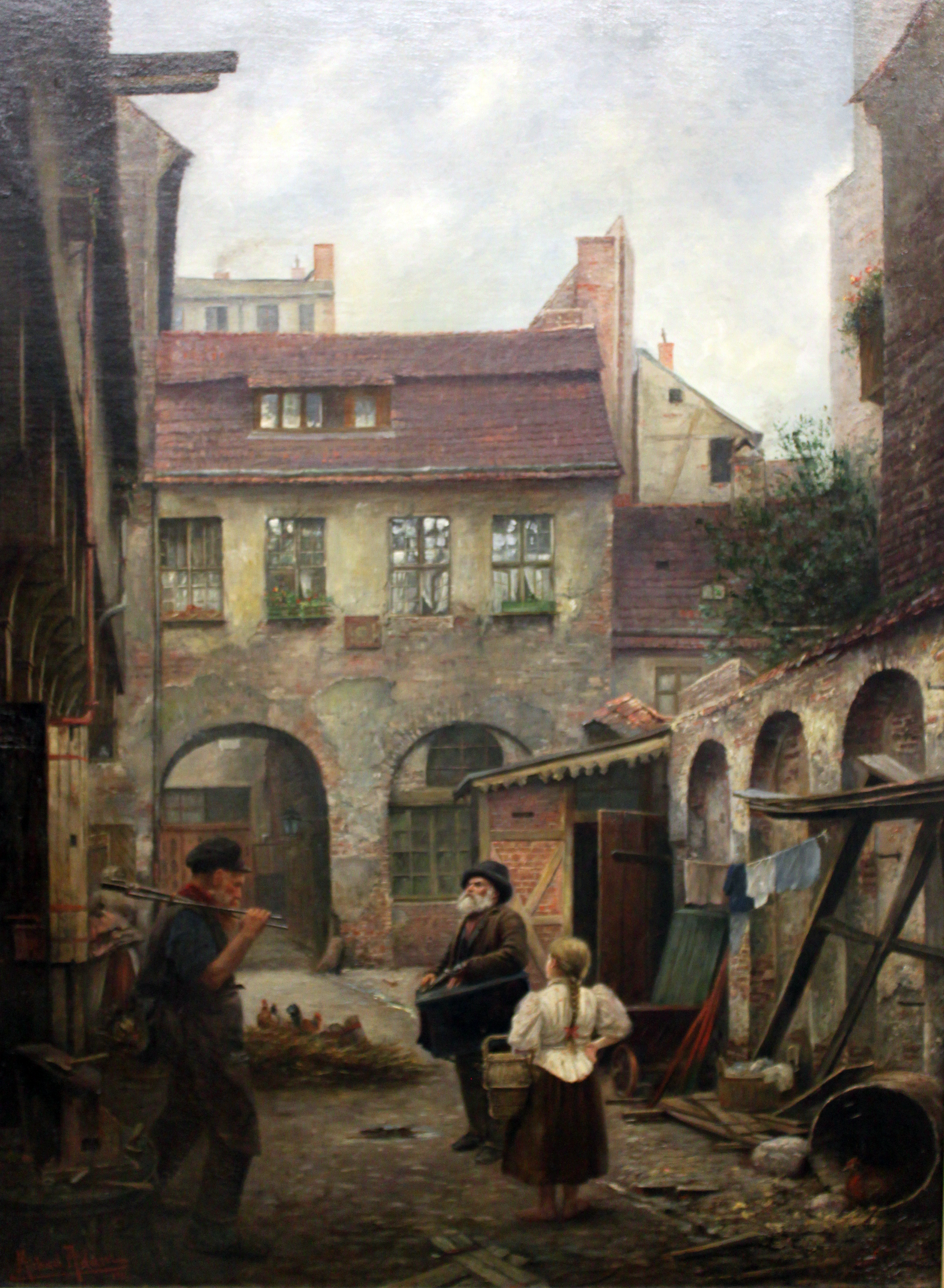 Am Krögel (street in Berlin